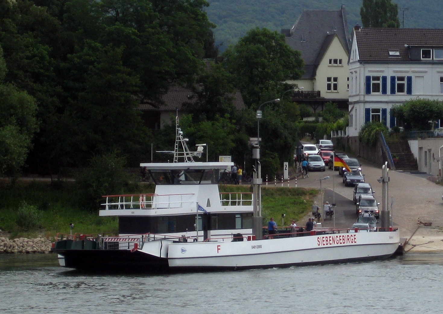 Rheinfähre "Siebengebirge" (verbindet Bad Honnef und Rolandseck) an der Anlegestelle in Bad Honnef. (Baujahr 2015, Lux-Werft/ Niederkassel-Mondorf).